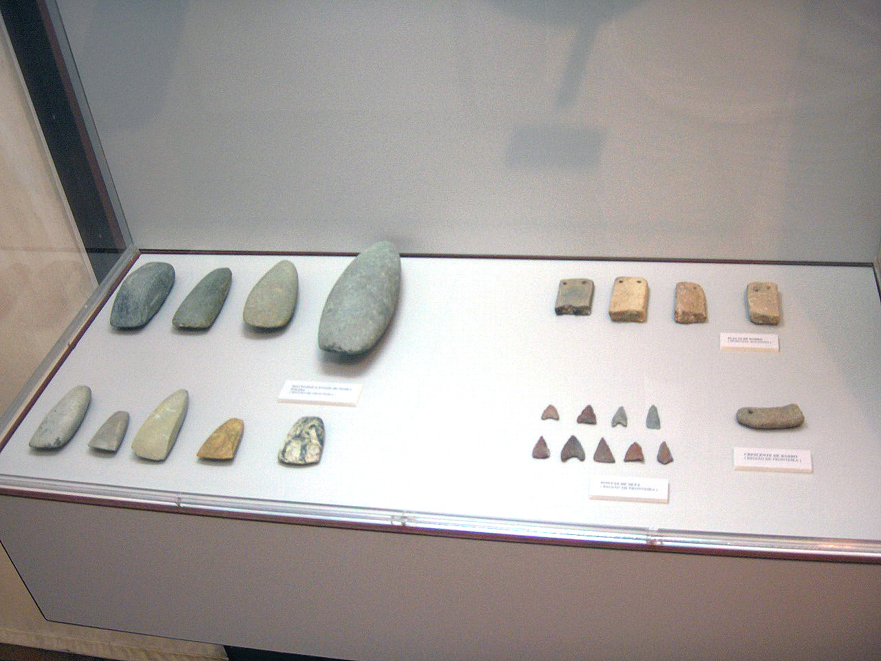 Prehistoric tools; Museu da Reinha D. Leonor; Beja, Portugal